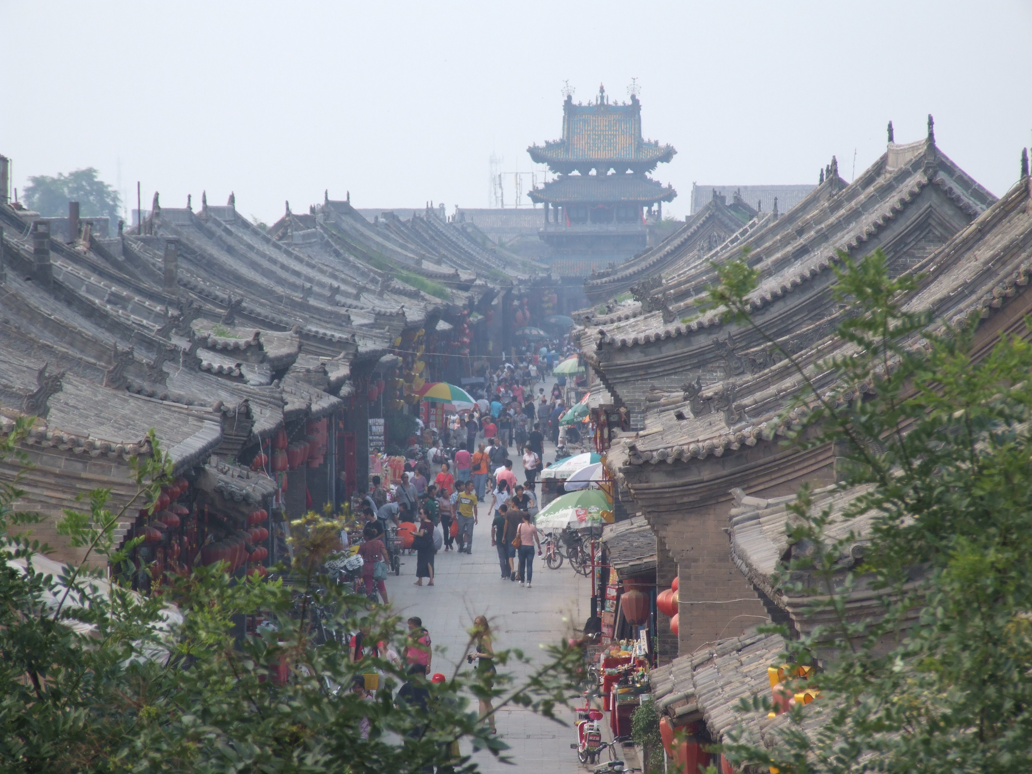 Pingyao